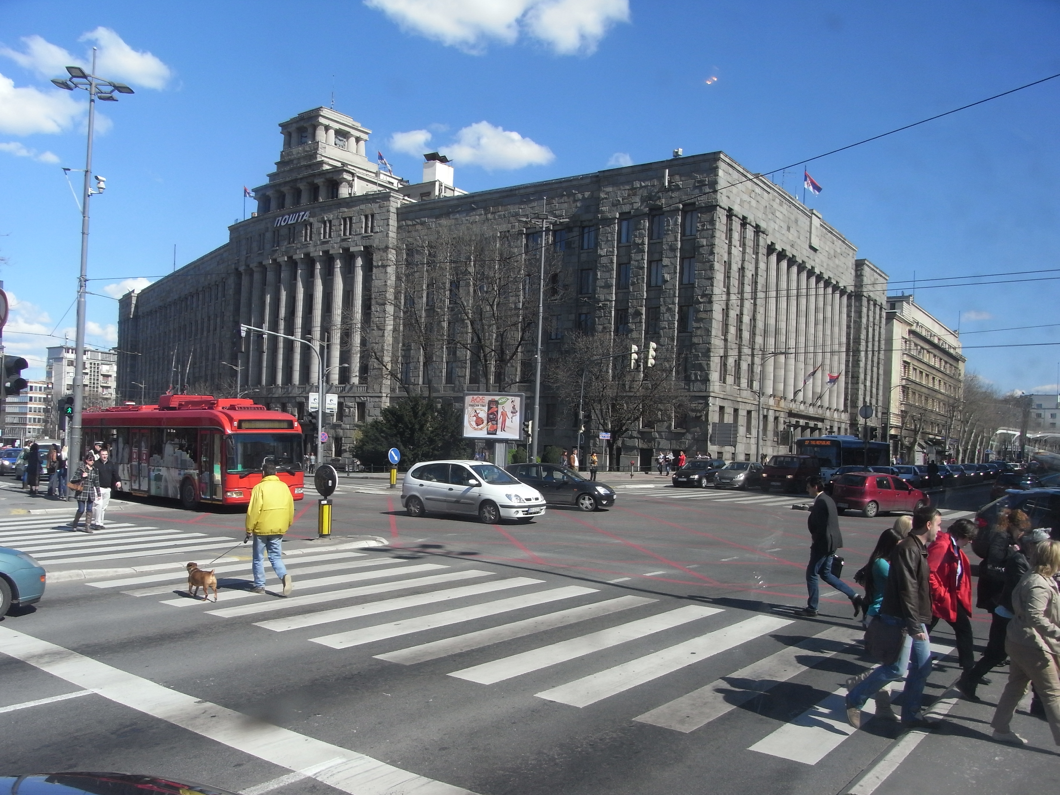 Un immeuble à Belgrade.